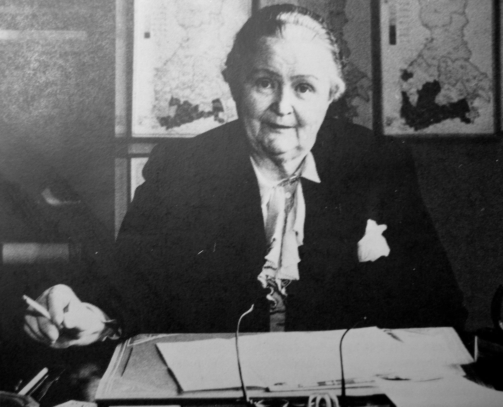 Hella Wuolijoki (1886-1954)